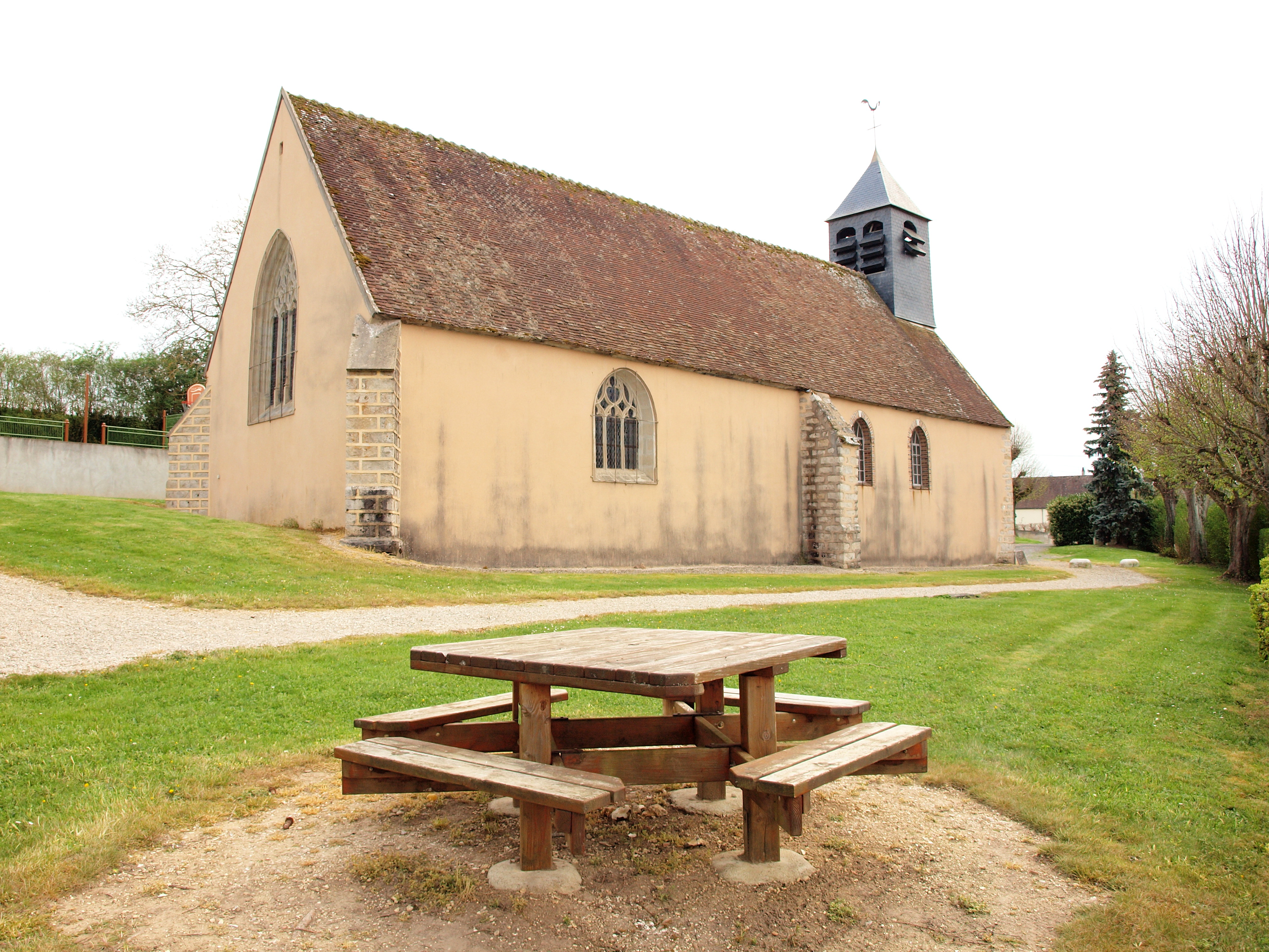 Église Notre-Dame de Subligny (Yonne, France)